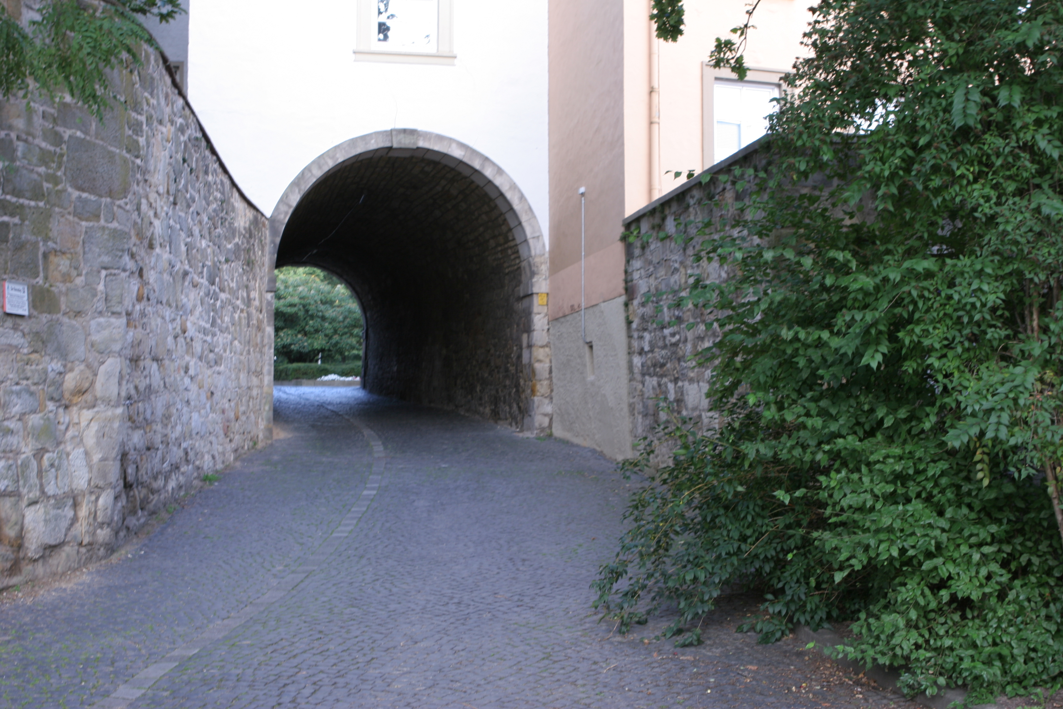 Hildesheim: Paulstor in die Domburg aus Richtung Westen; durch dieses Tor führte der Hellweg